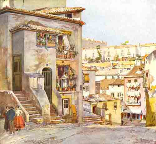 Esta imagem (em domínio público por morte do autor há mais de 75 anos) faz parte de um conjunto de 100 aguarelas e gravuras criadas em 1910-1920 e publicadas no livro Lisboa Velha (Afonso Lopes Vieira (prefácio). Anuário Comercial: Lisboa, 1925).